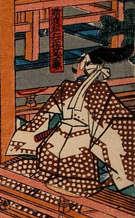 東山殿猿楽興行図